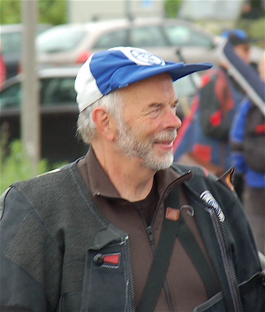 Bjørn Solberg, skytterkonge 1978, 1983 og 1984